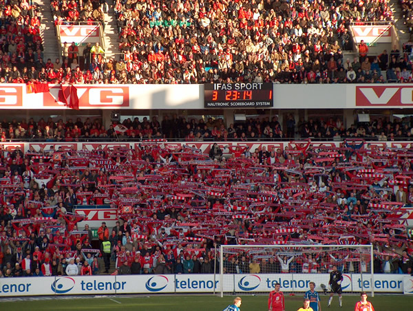 Bastionen, Cupfinalen 6 november 2004